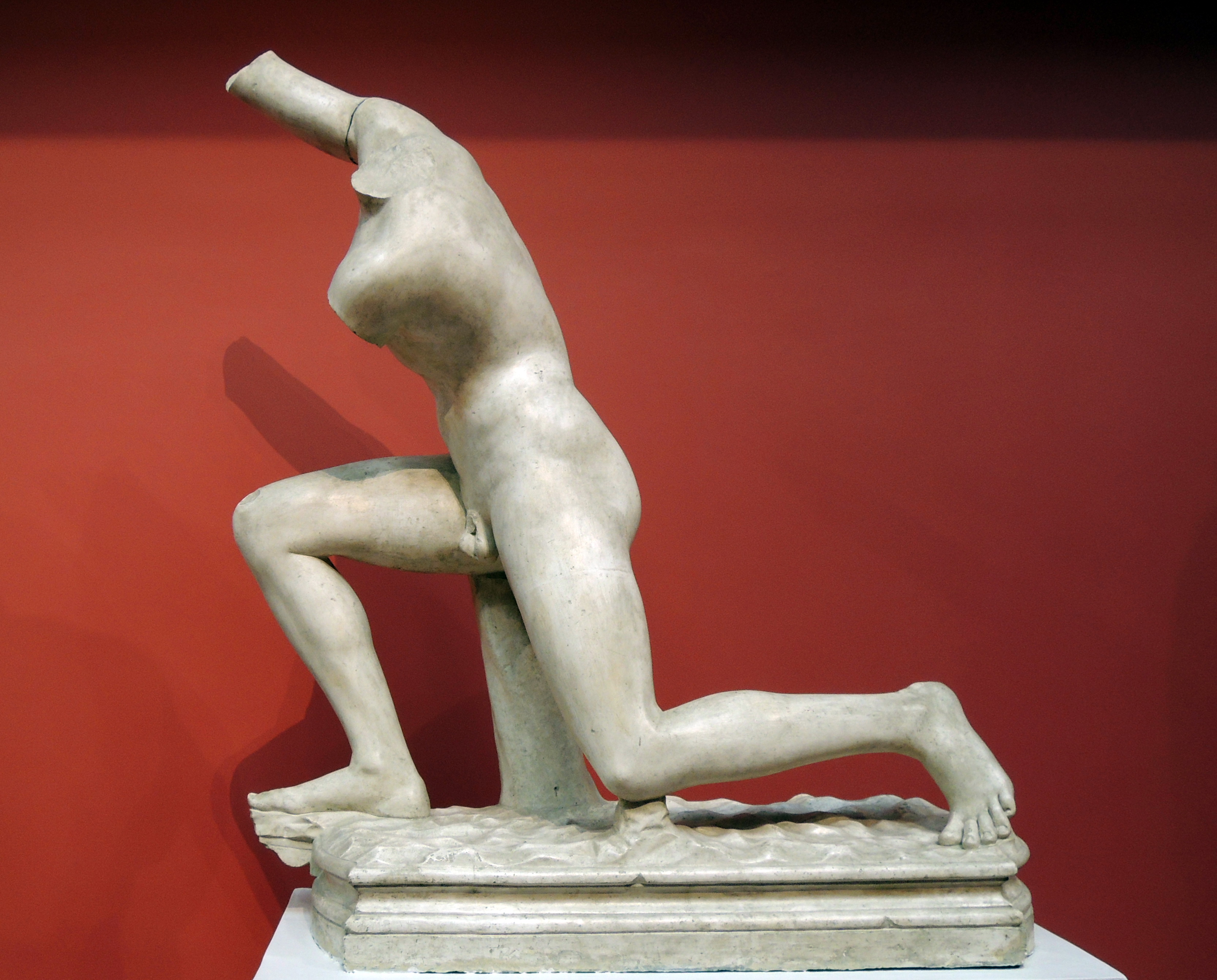 Юноша из Субиако. Римская копия греческого оригинала середины V в. до н.э. Подлинник Мрамор Национальный музей (Термы Диоклетиана), Рим